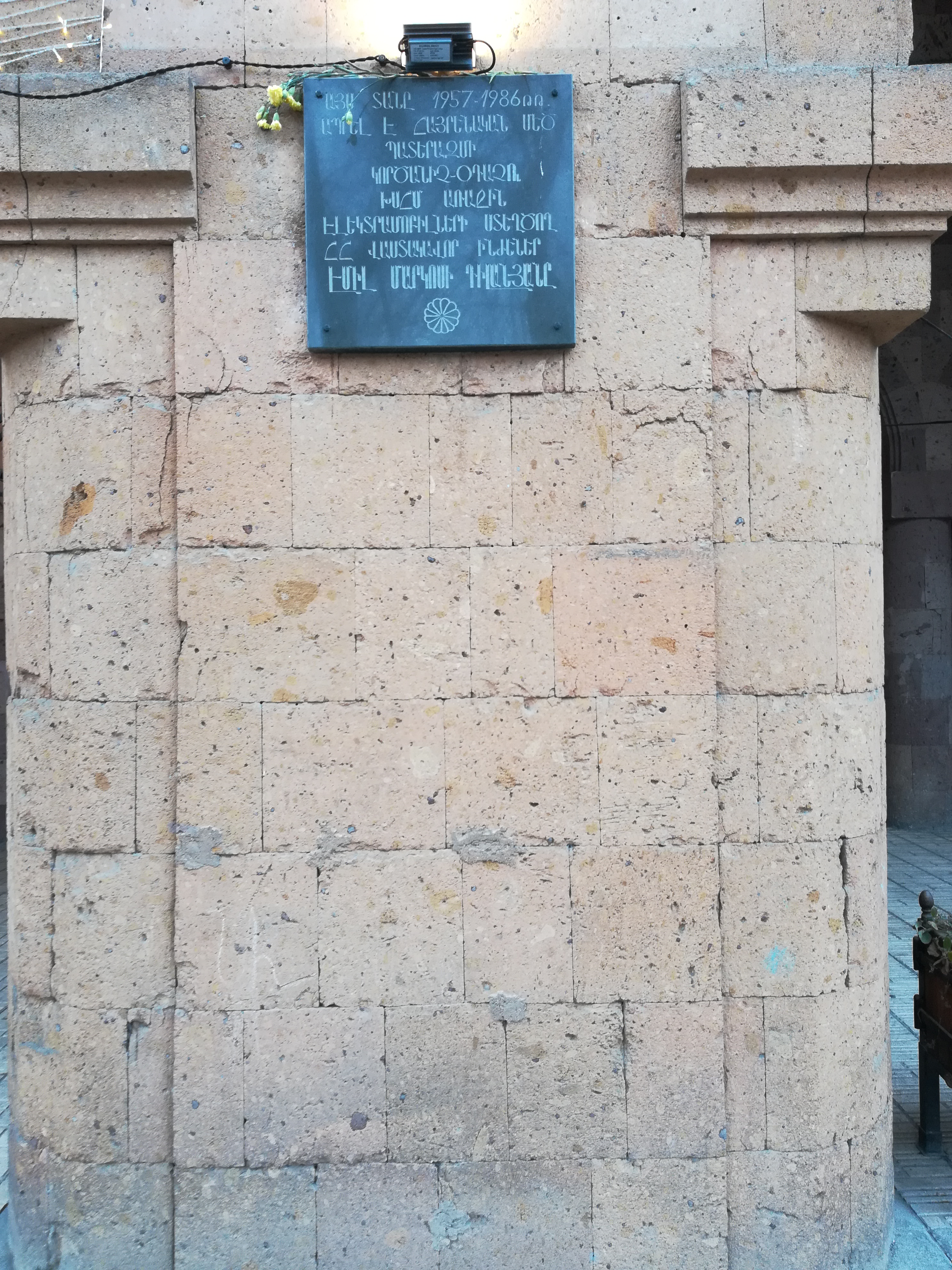 Ереван. Мемориальная доска Диланяну Эмилю Маркосовичу (1917—1986) — армянскому советскому специалисту в области электротехники